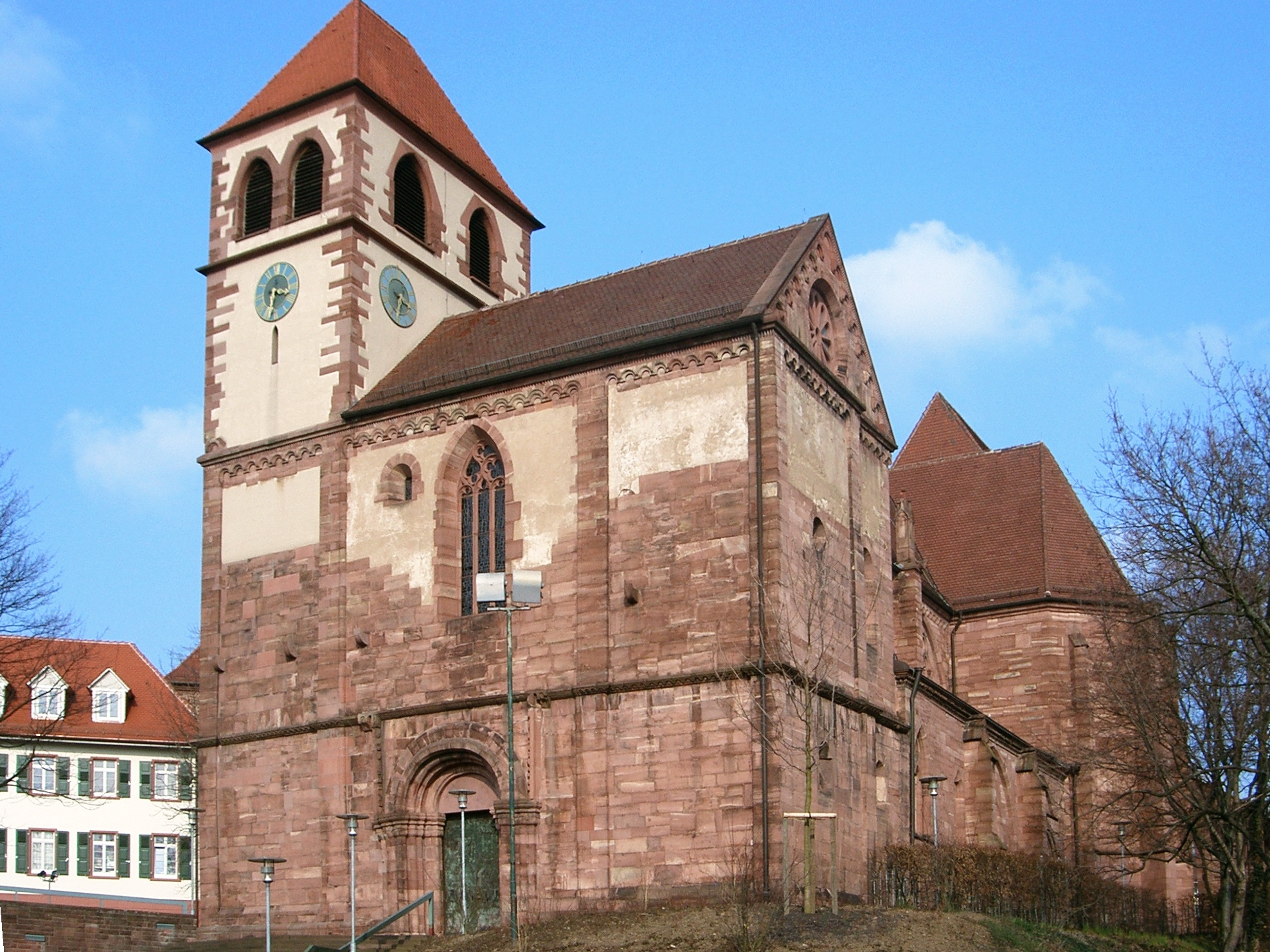 Pforzheim St. Michael von Südwest. Vorhalle und Turm erbaut 1225-1235. Eigenes Photos von März 2004.